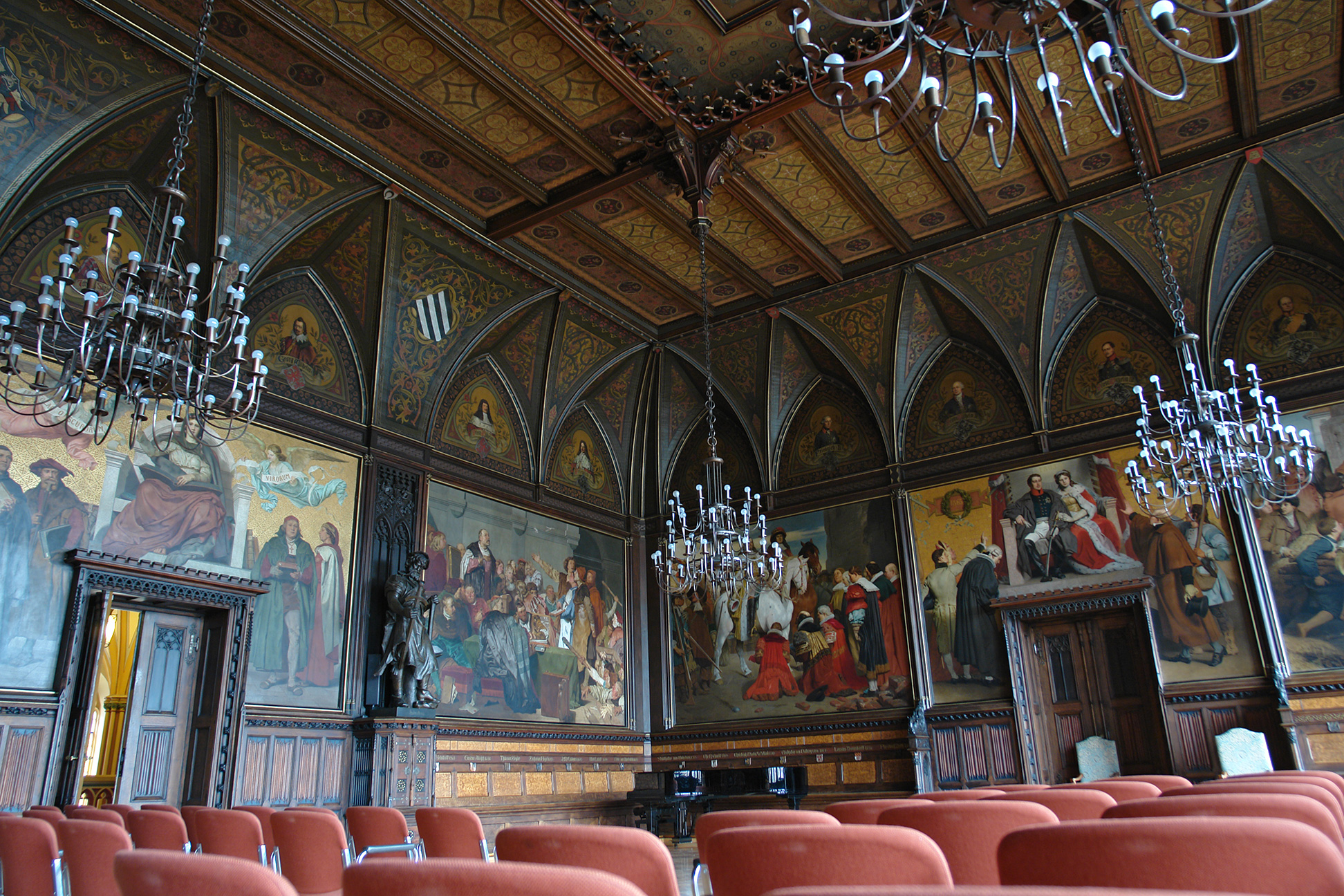 Erfurt, Thuringia, Germany: Rathaus, der Festsaal